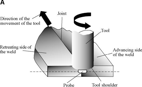 Ilustração do processo de solda por SFW